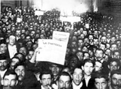 mitin anarquista